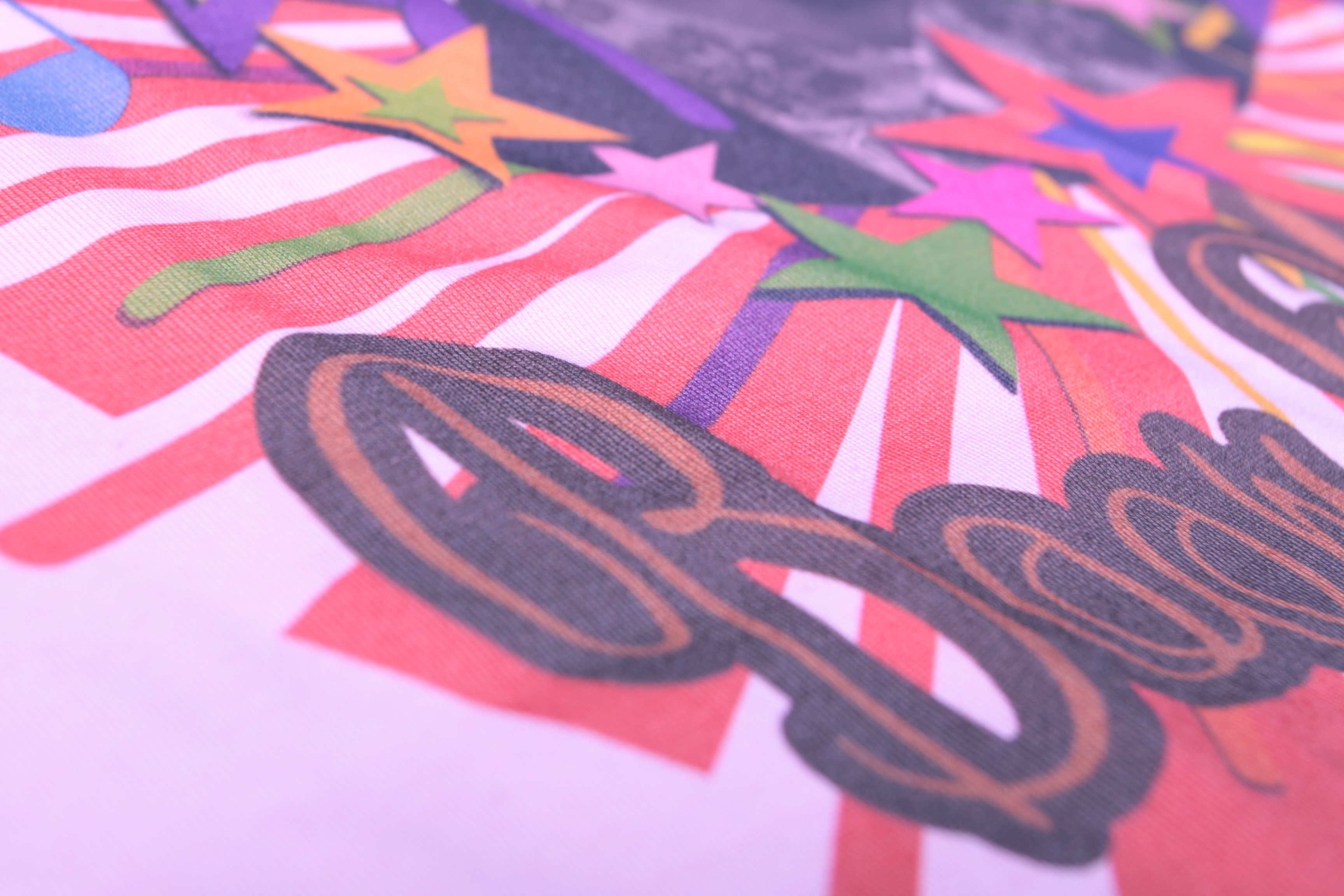 Цифровая печать